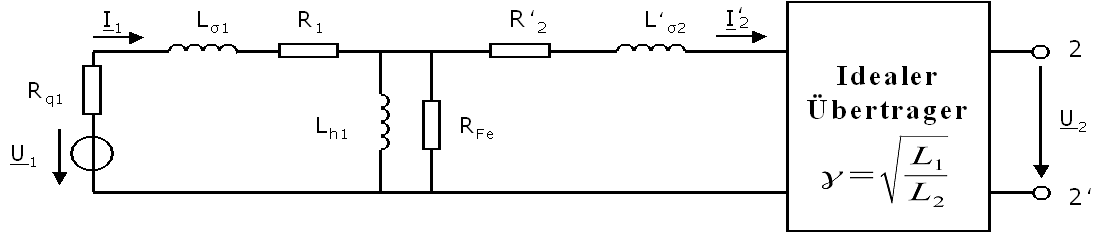 Ersatzschaltbild Transformator in Kettenschaltung